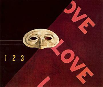 Charles Demuth: Love, Love, Love. Homage to Gertrude Stein, Museo Thyssen-Bornemisza, Madrid